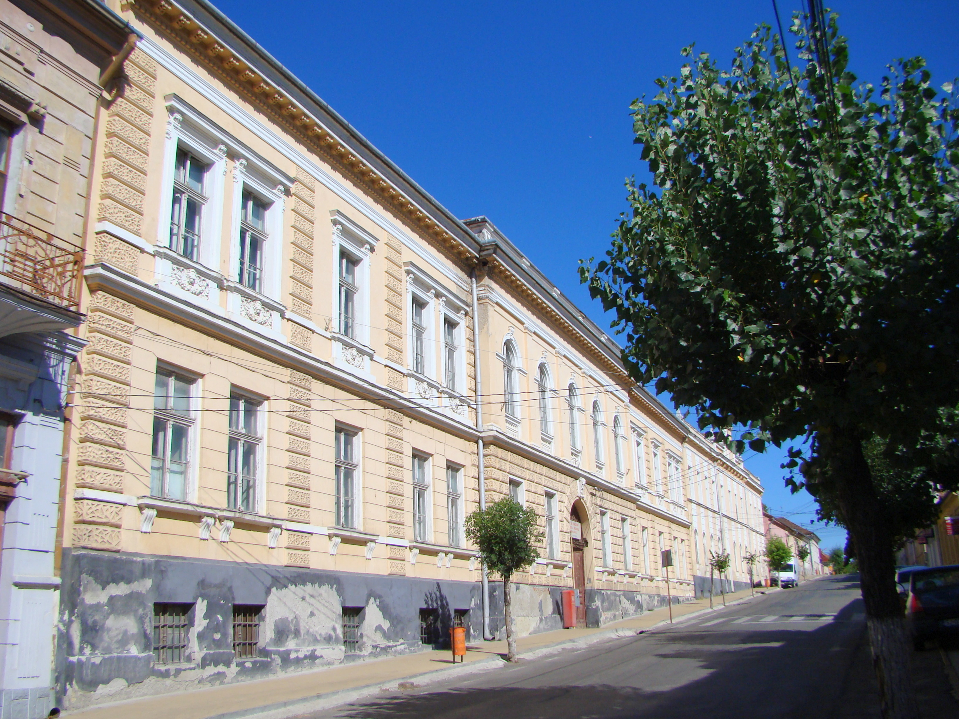 Fosta bibliotecă orășenească, Azi Centrul de Cercetări și Asistență Medicală, oraș Șimleu Silvaniei